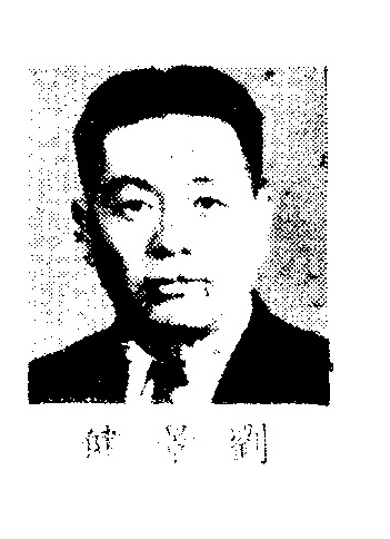 中文（中国大陆）: 制憲國民大會代表